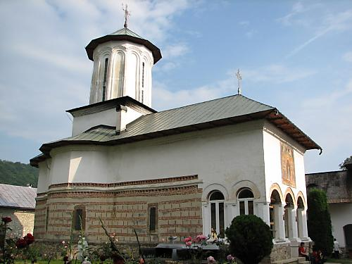 fotografia îmi aparţine 01